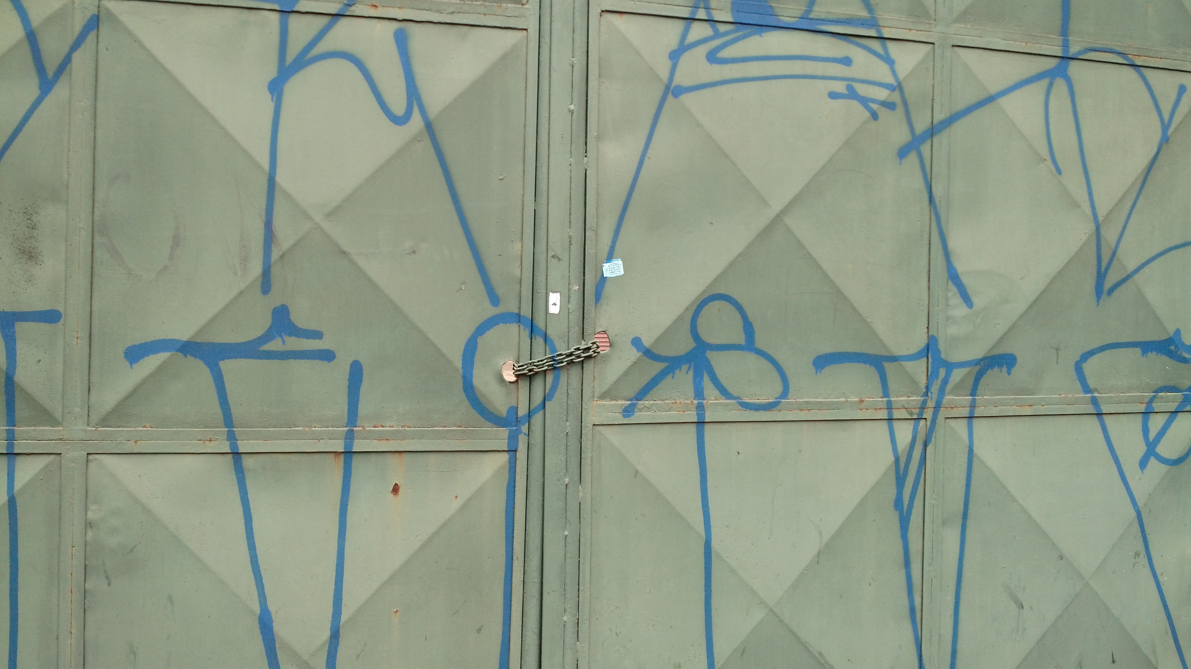 Degradação da área externa dos Moinhos Minetti Gamba